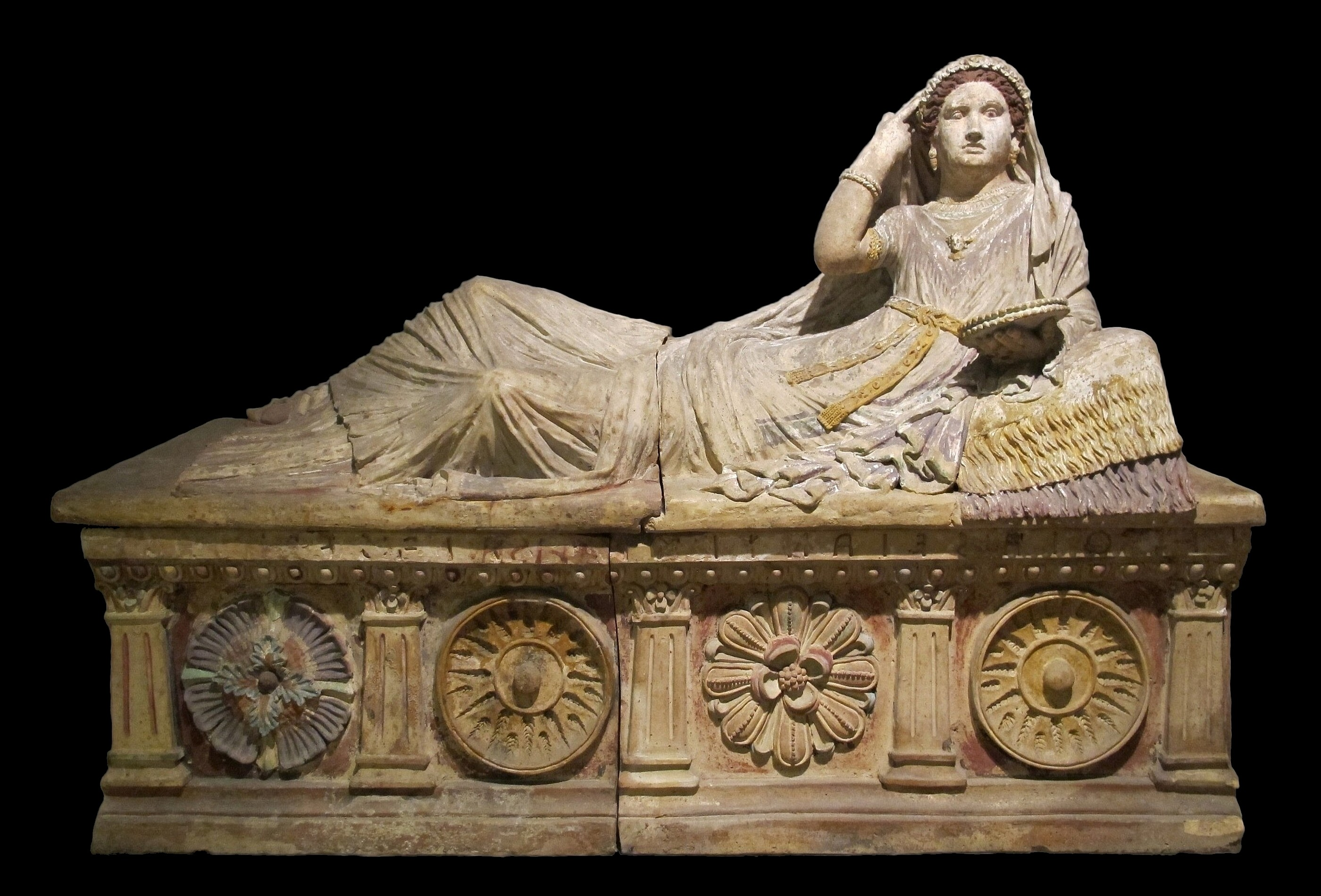 Sarcofago di Larthia Seianti